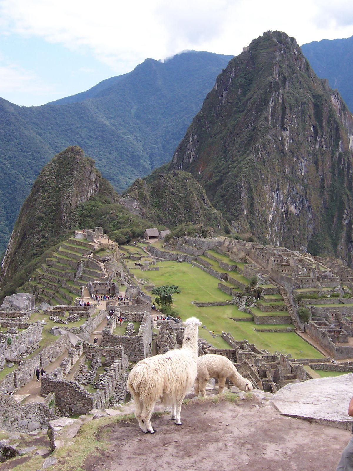 Llamas Lama glama at Machu Picchu, Peru.100_3399